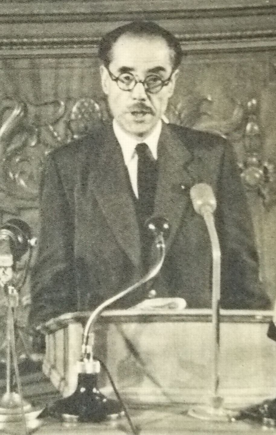 原彪